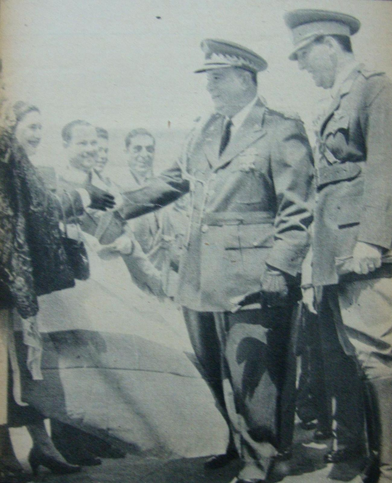 El Presidente de Argentina, General Juan Domingo Perón (derecha) recibe en su visita al Presidente de Nicaragua, General Anastasio Somoza (centro), quien saluda al público en el Aeroparque de Buenos Aires.